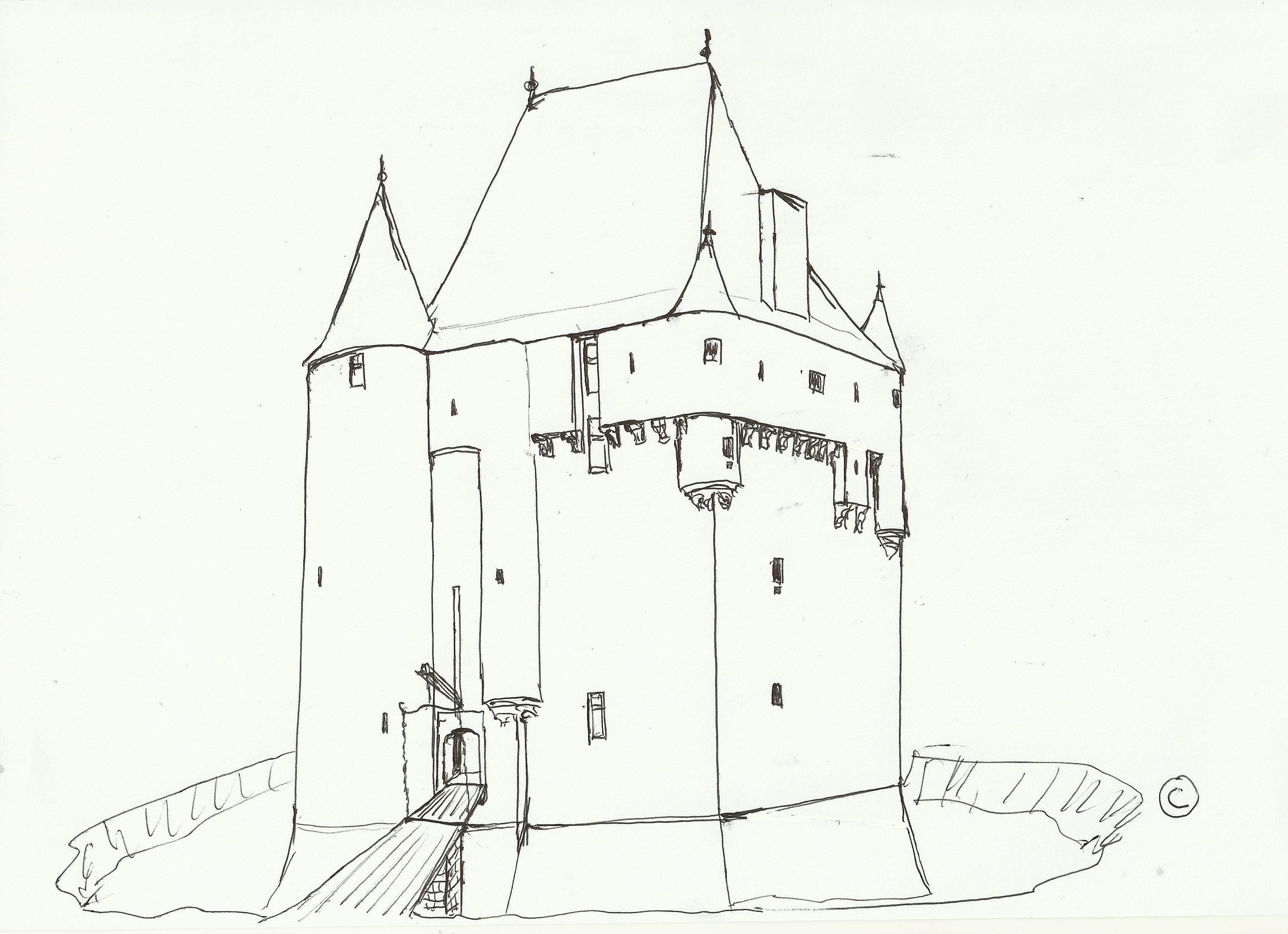 Croquis de restitution de la tour de Moricq selon la restitution de Mr Corvisier.